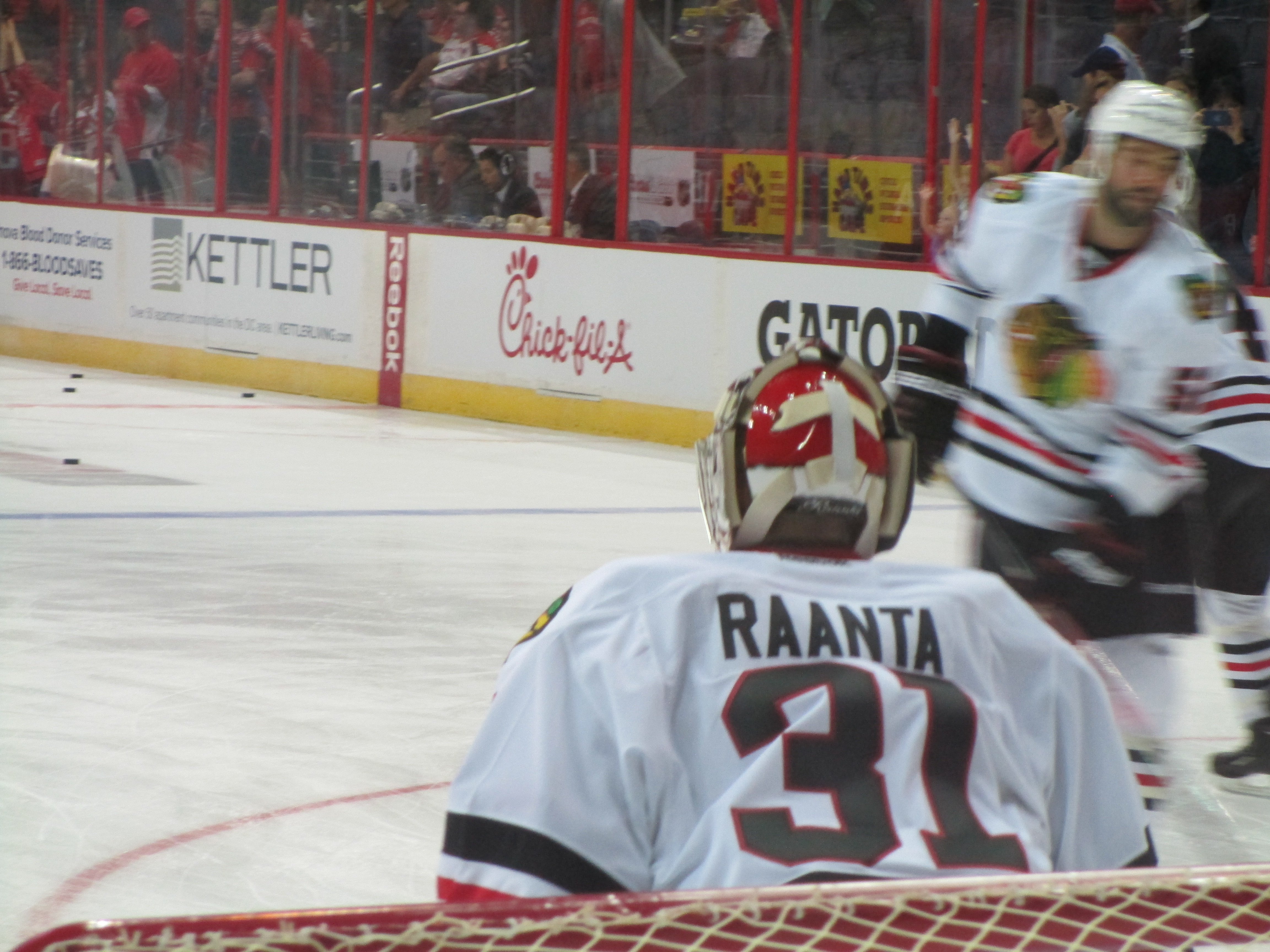 Goalie Antti Raanta